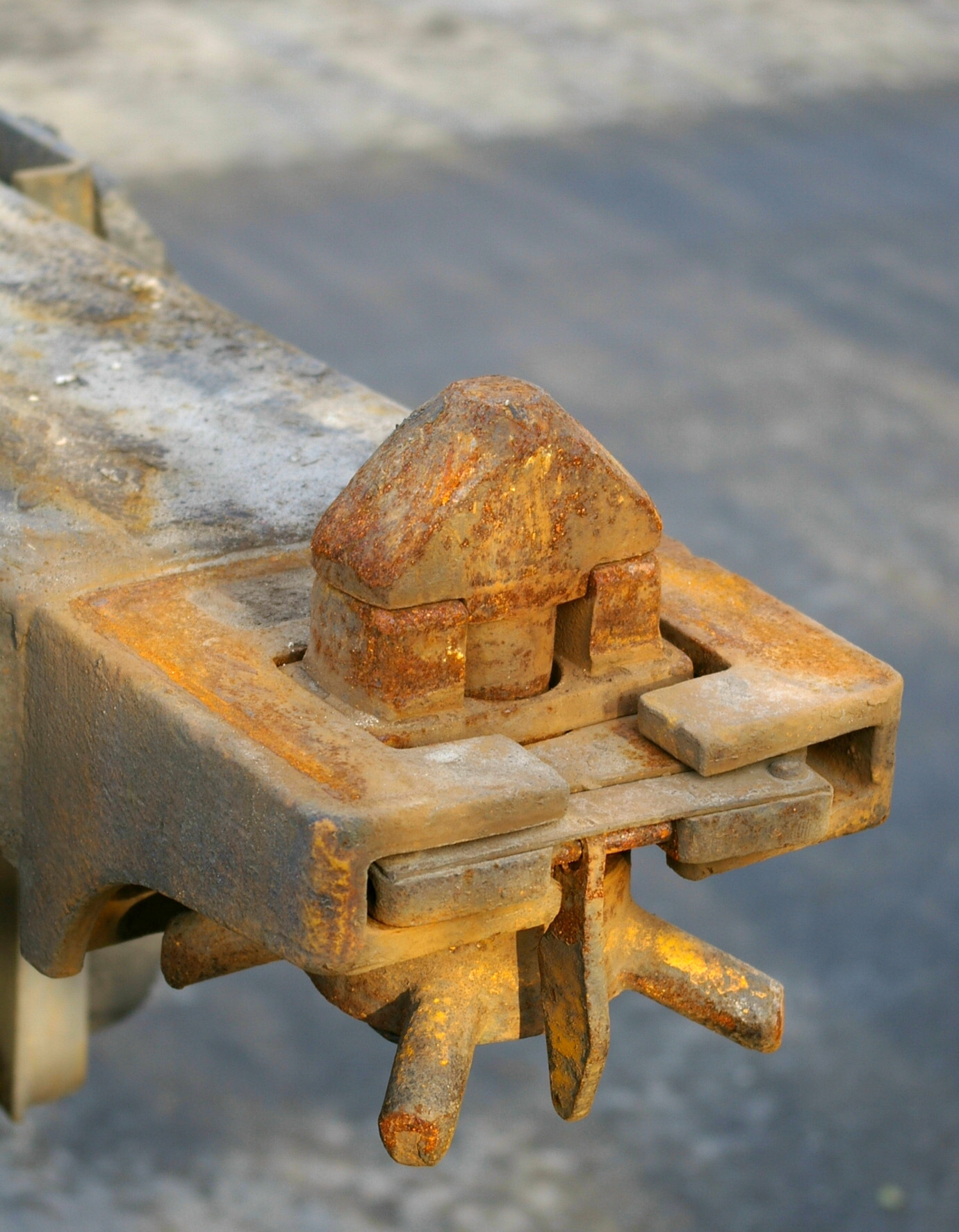 Rost an einer Container-Befestigung. – Verriegelung an einem Trailer (LKW-Sattelauflieger) für Container mit Handrad und Sicherung im Containerlager im Hafen Dortmund